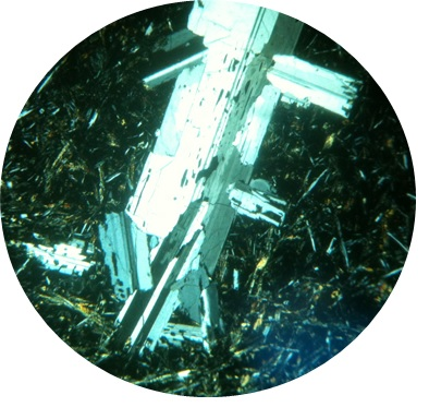 Plagioclasa en luz polarizada